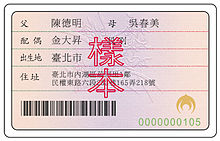 中華民國九十四年式國民身分證樣張背面。